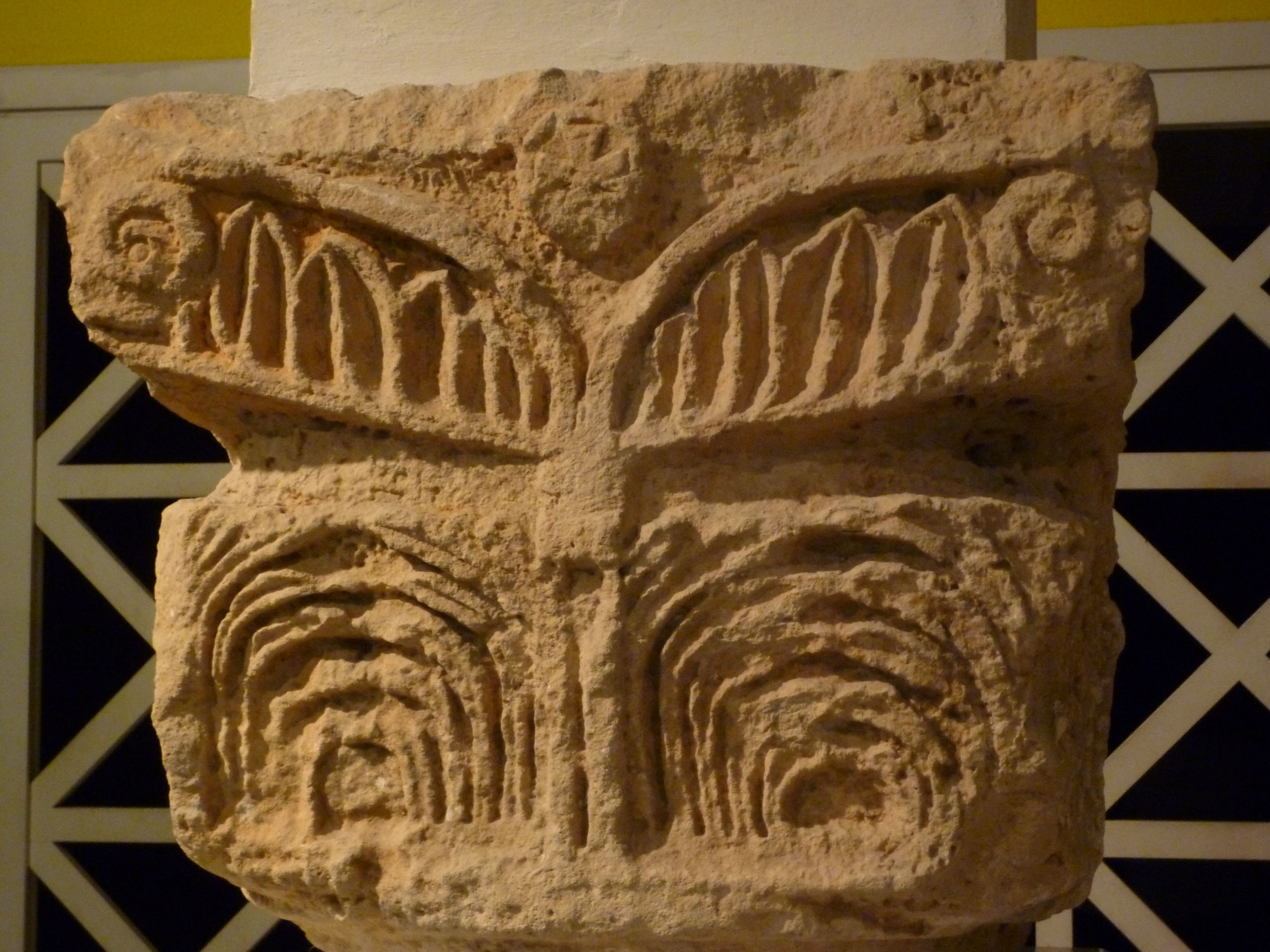 Tripoli-Nationalmuseum Kapitell-Fragment